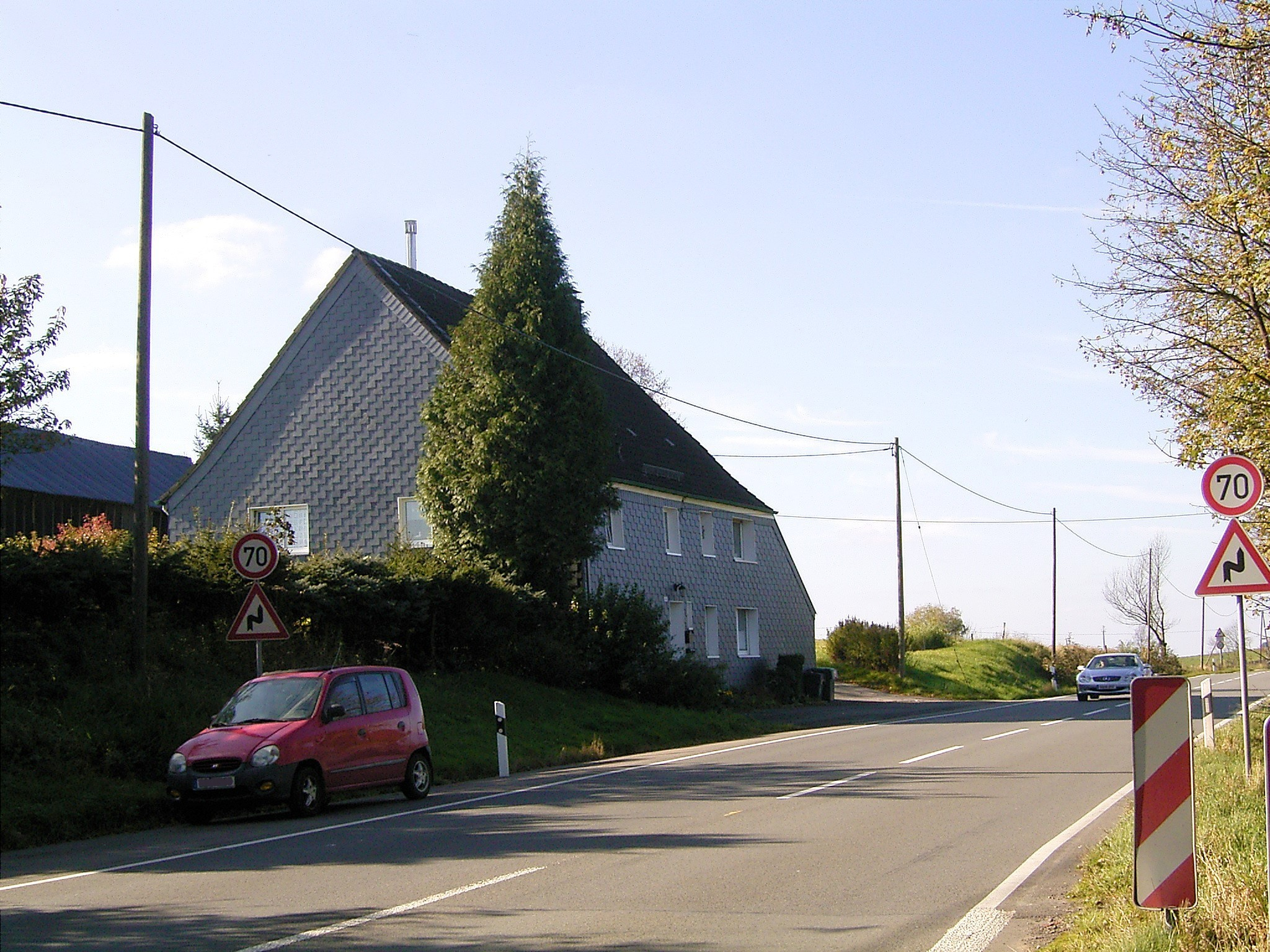 Radevormwald